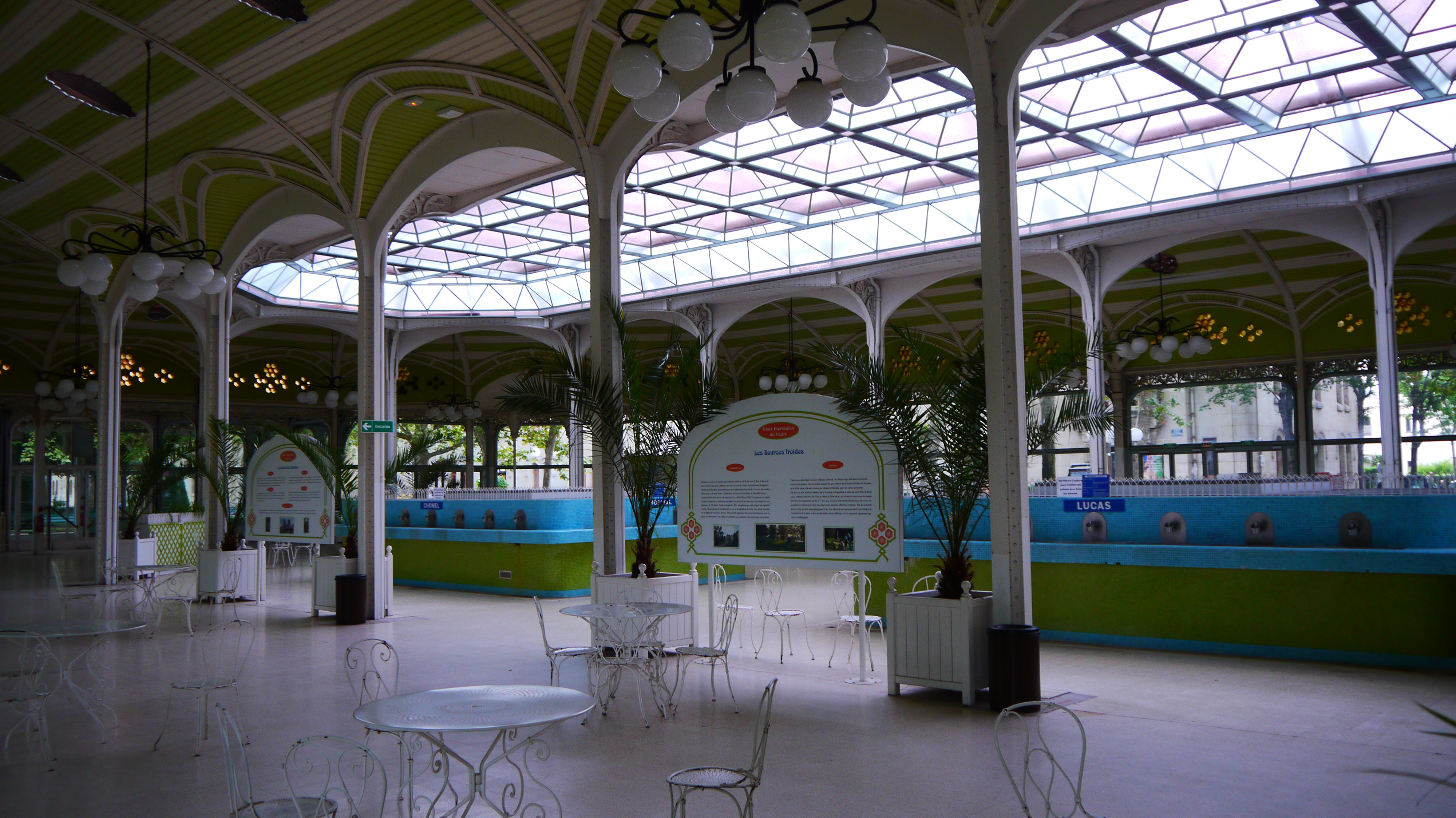 Hall construit autour de 4 sources en 1903. Son architecture métallique est l’œuvre de l’architecte Charles Lecoeur et du ferronnier d’art Emile Robert.